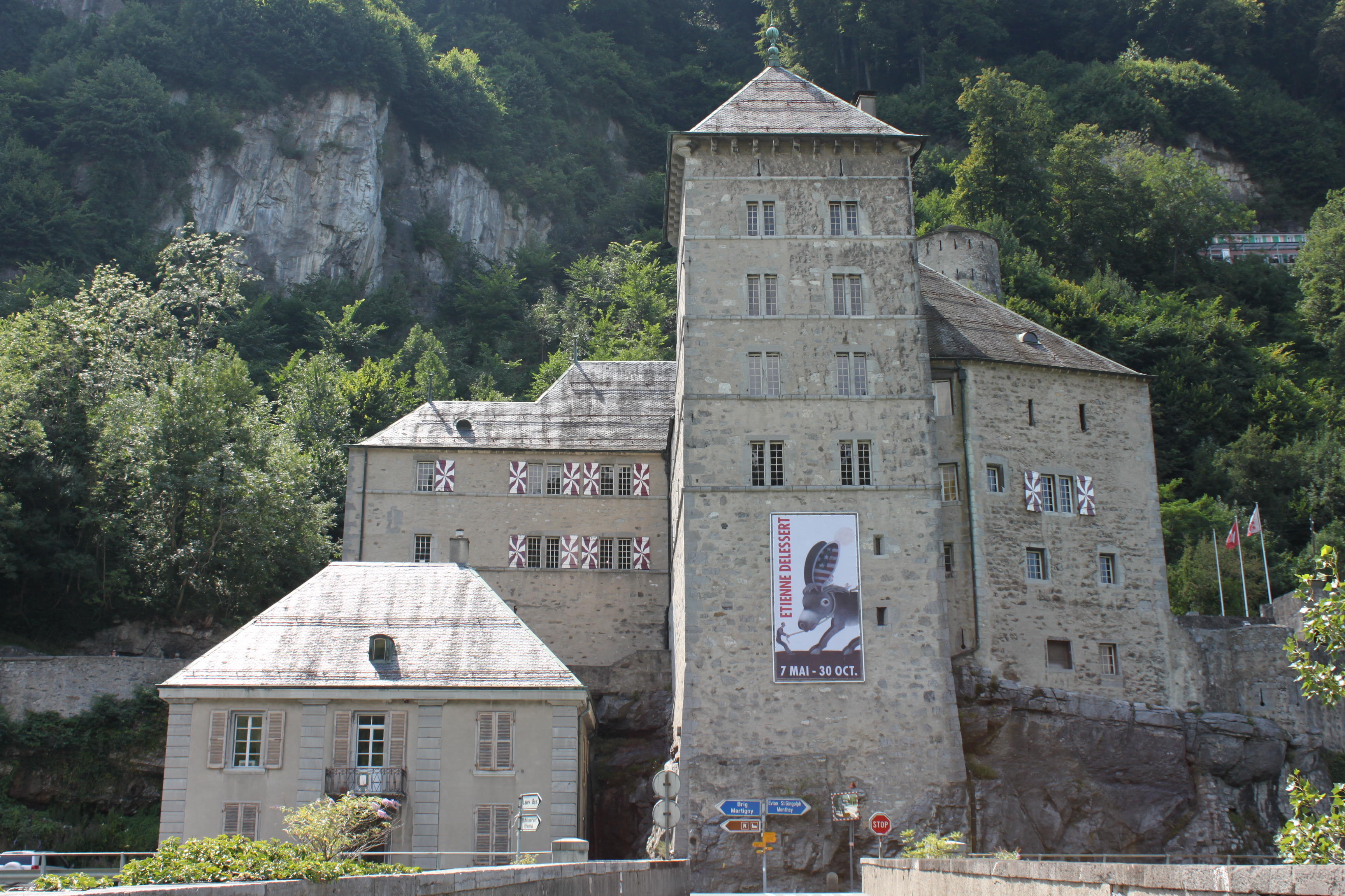 Château de St-Maurice (Suisse)